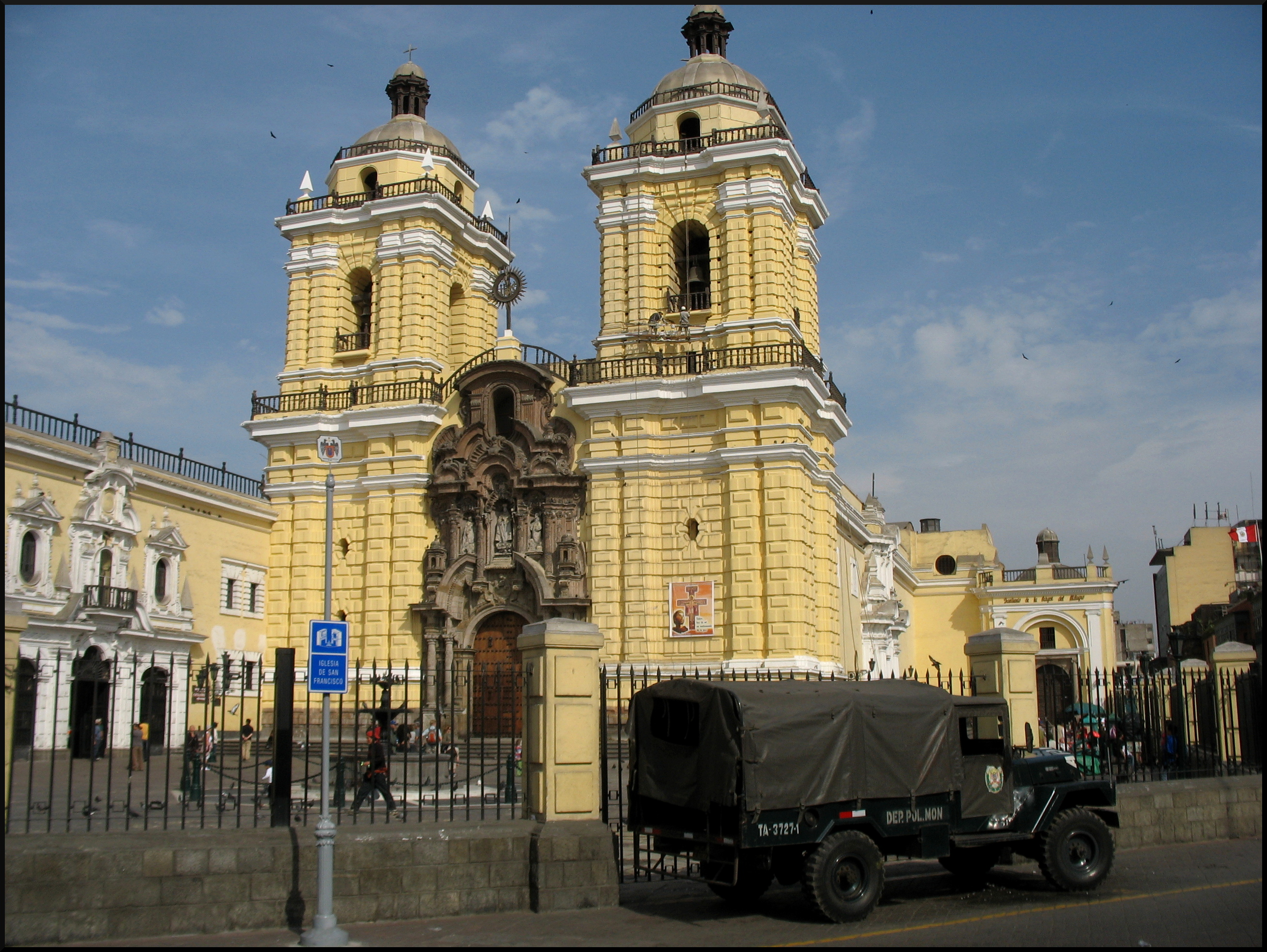 San Francisco de Asis (Lima)